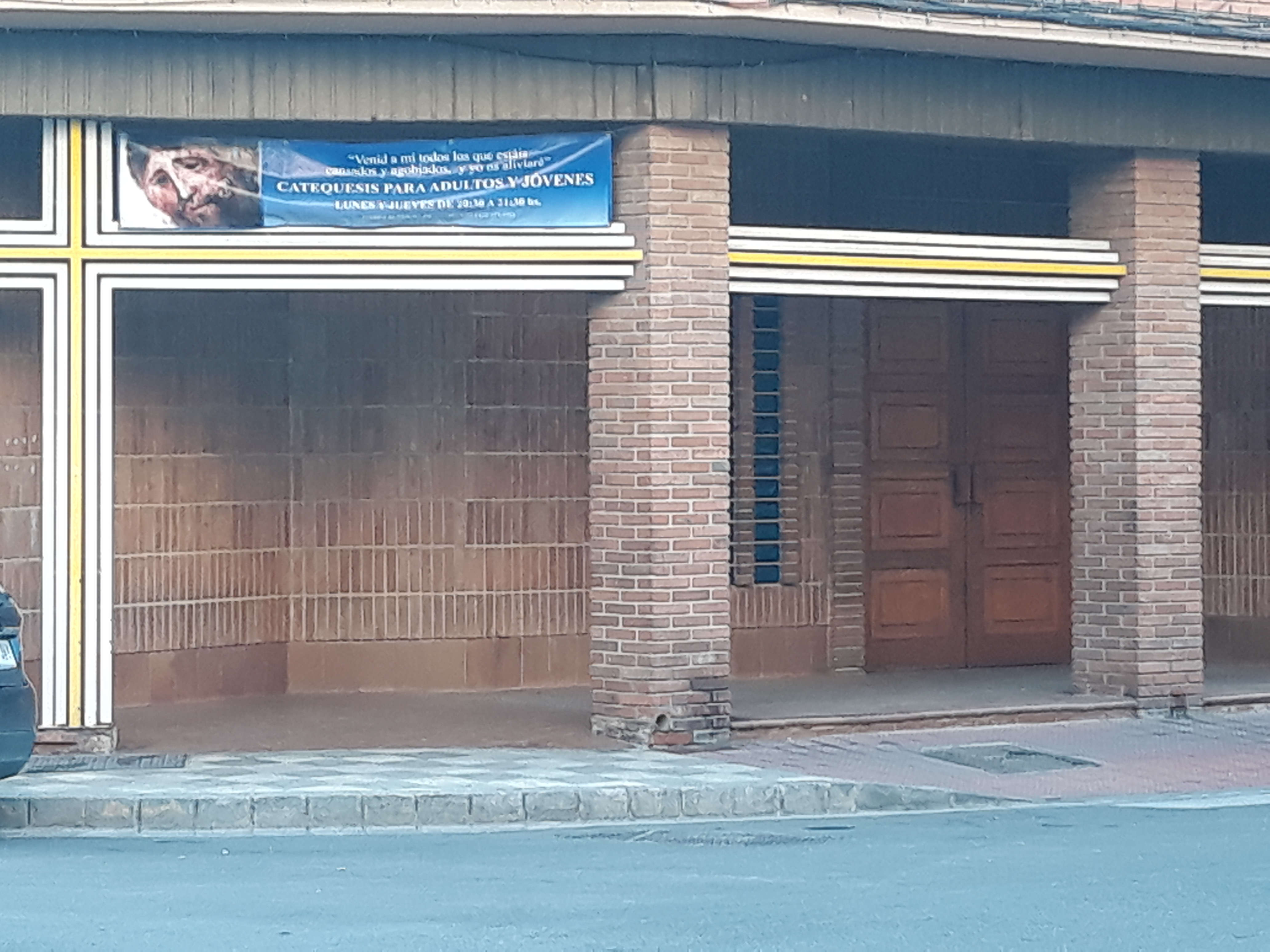 Iglesia del Sagrado Corazón de Jesús, Albacete.